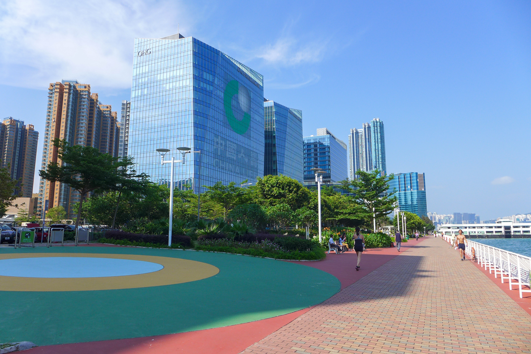 Hung Hum Promenade